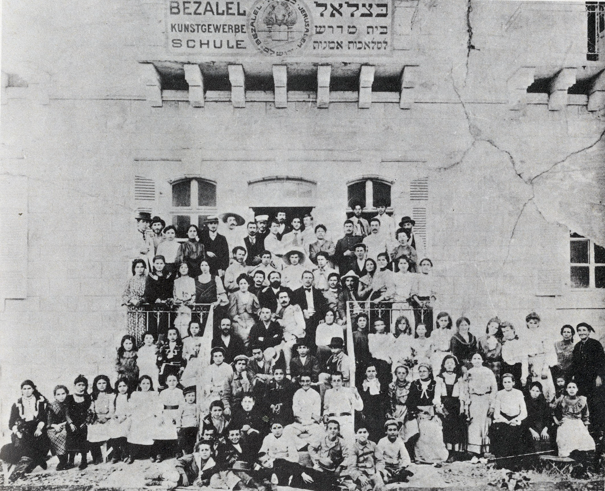 תלמידי ומורי "בצלאל" בכניסה לבניין ברחוב החבשים. במרכז: שץ ולחובסקי. תצלום: אצ"מ.